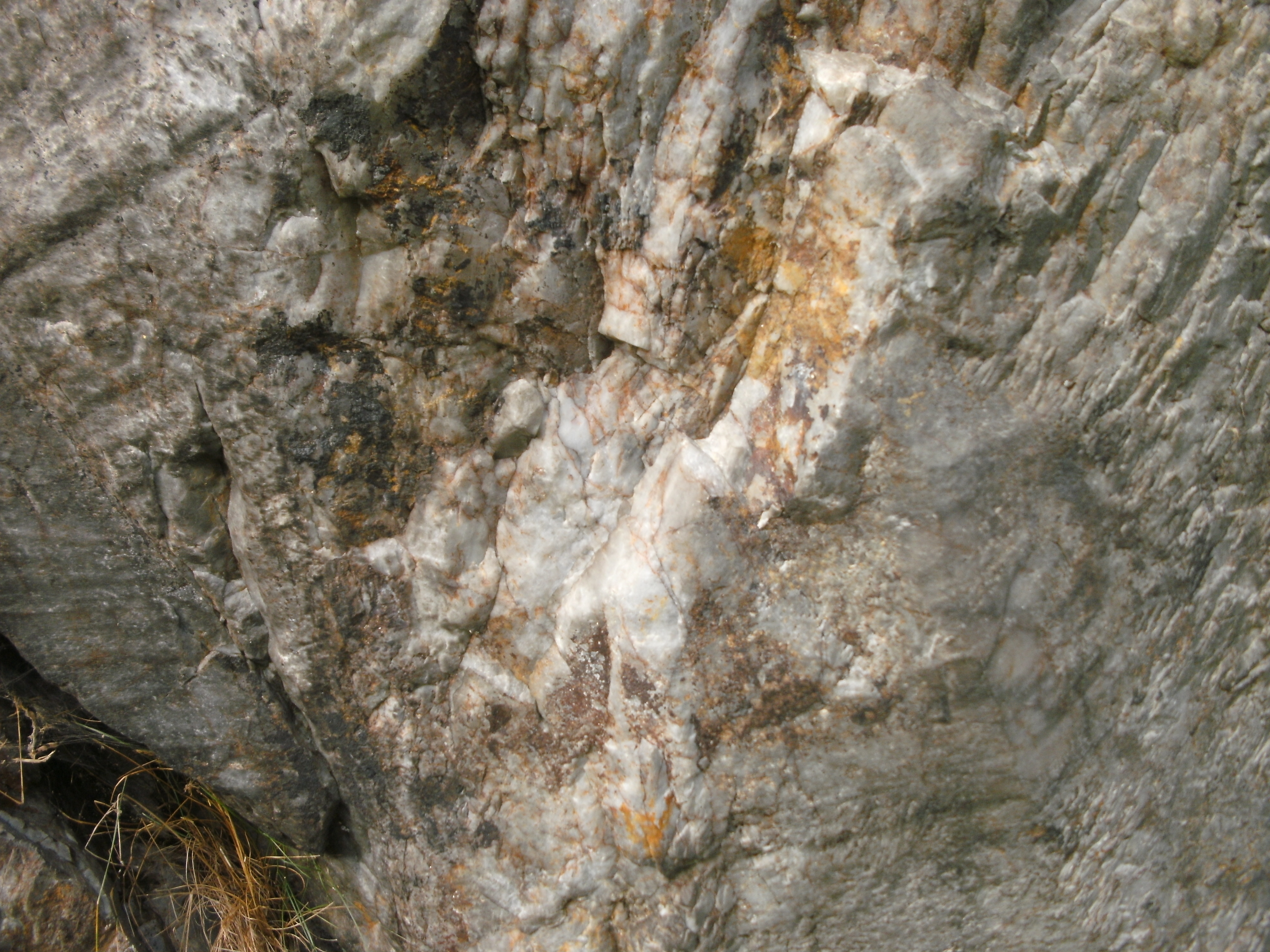 Kreuzberg in Pleystein, Rosenquarzfelsen, Geotop